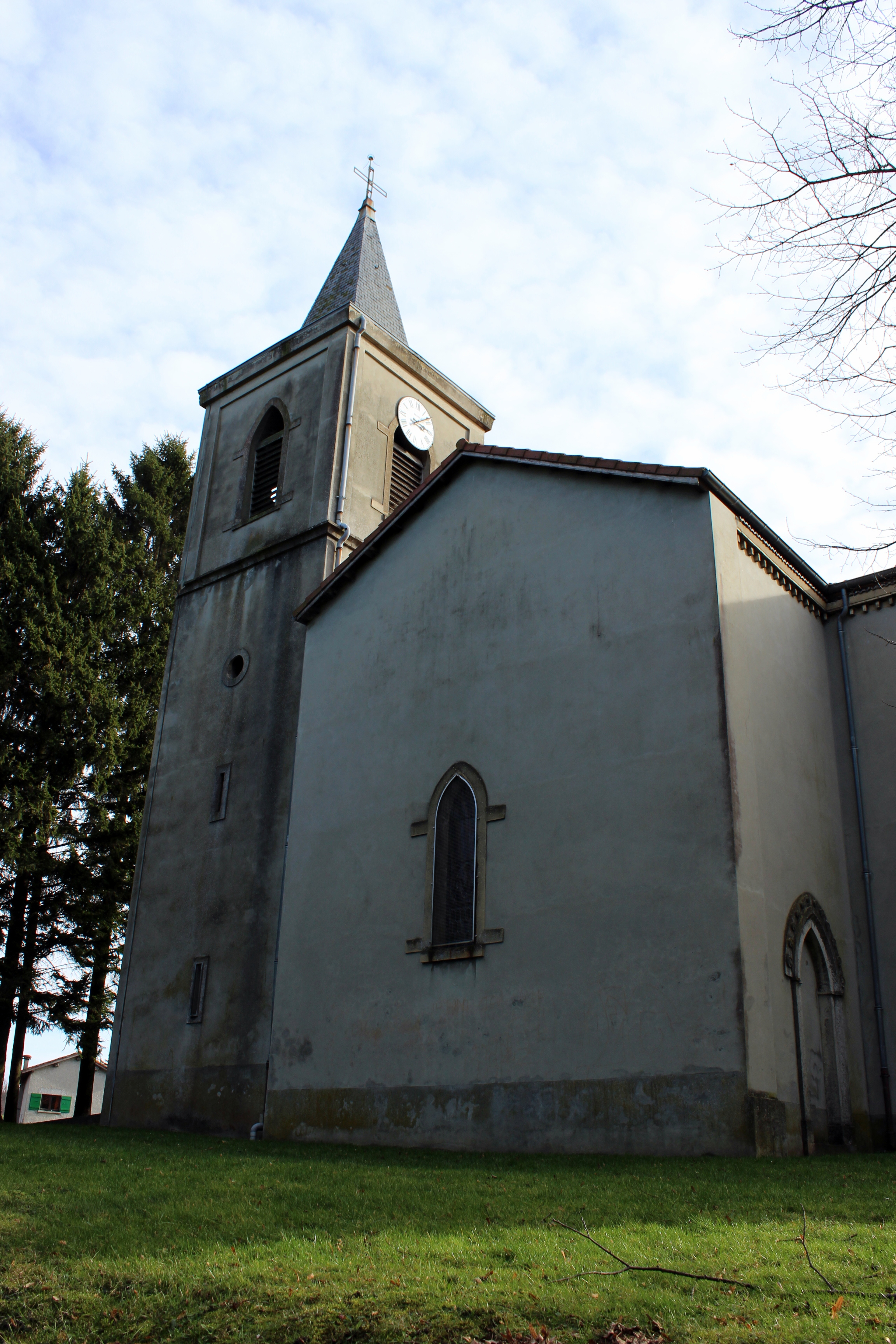 Eglise de Bonnefamille.